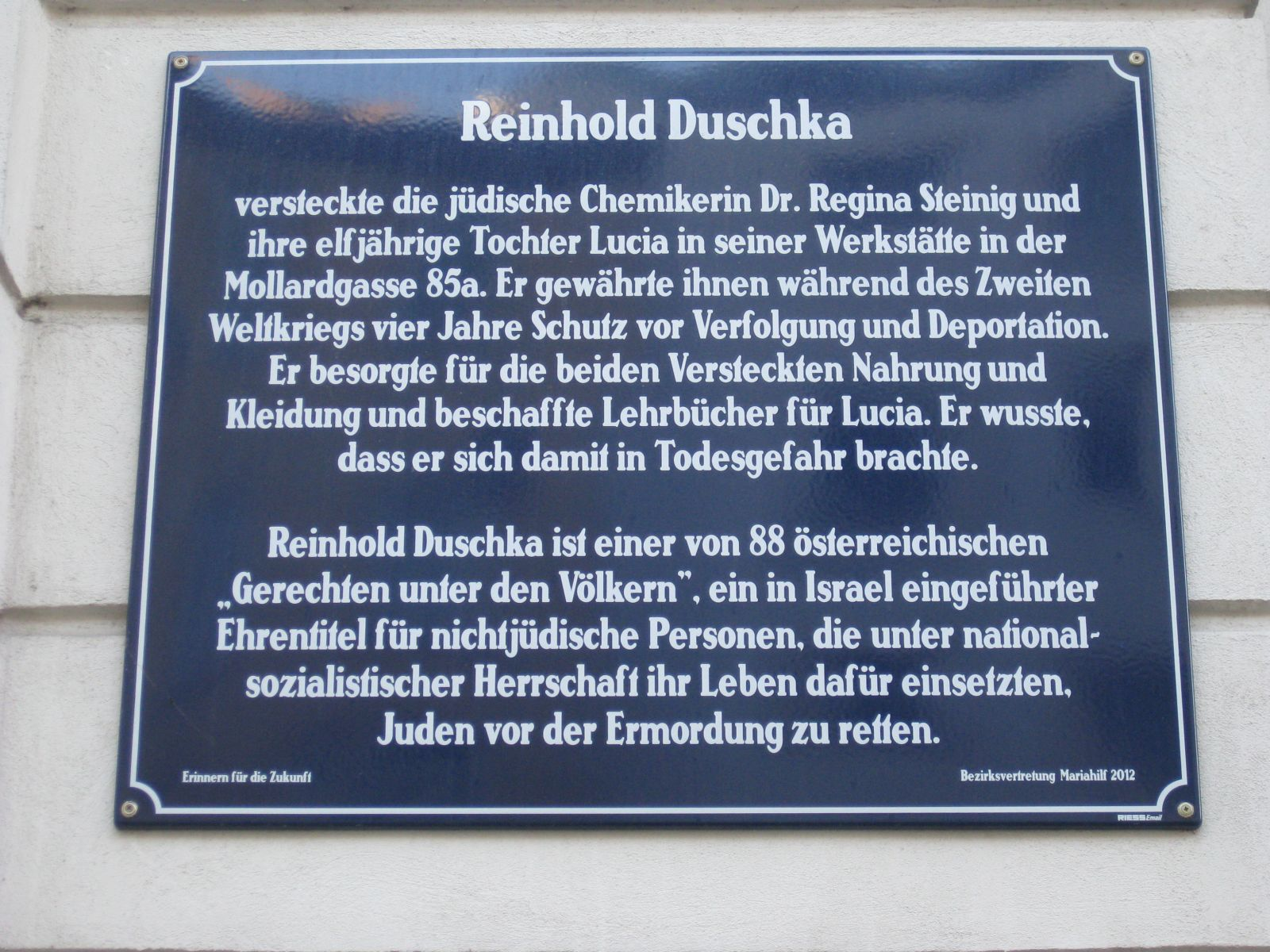 Gedenktafel für den "Gerechten der Völker" Reinholf Duschka am Haus Mollardgasse 85a